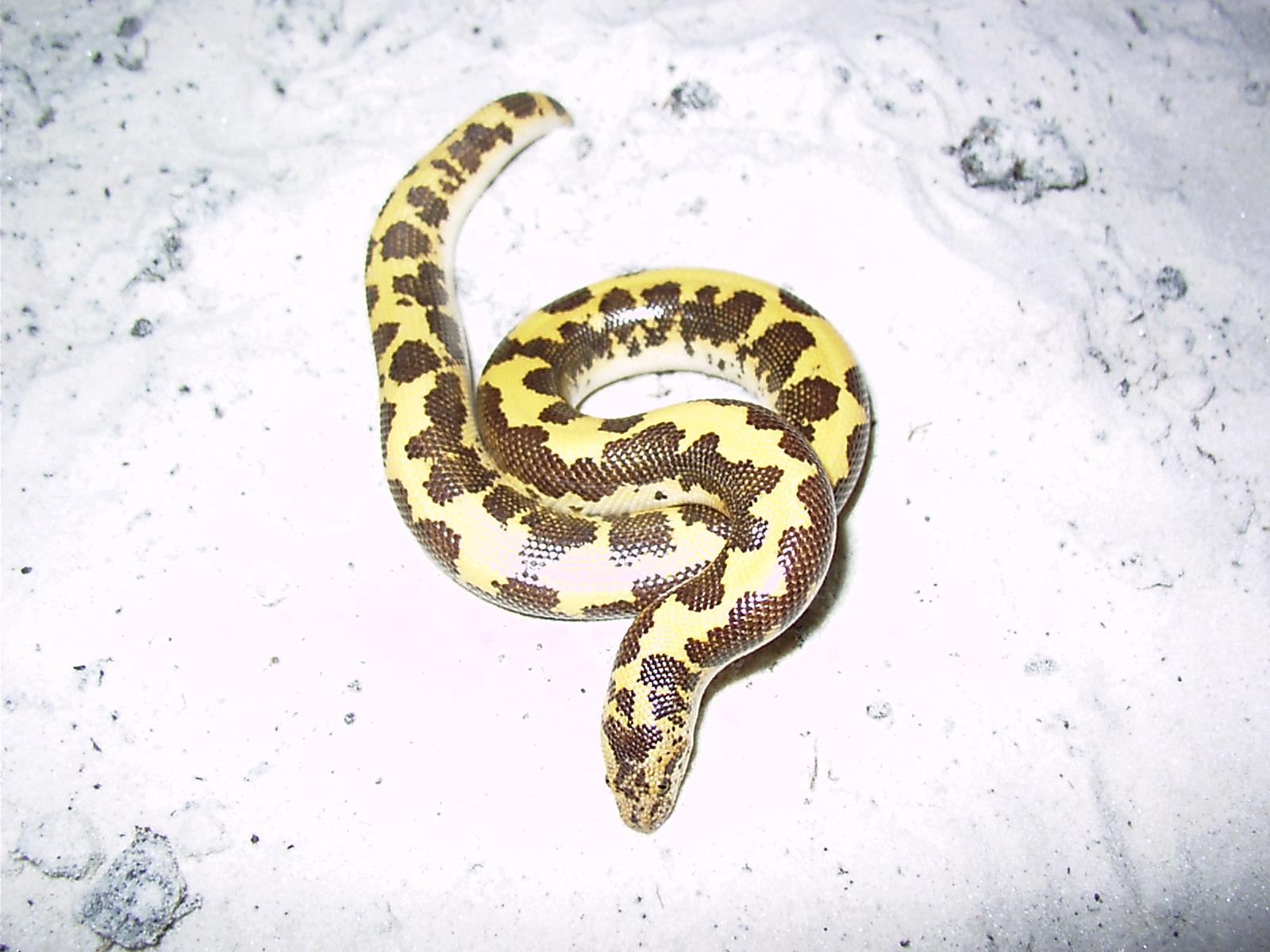 Etwa 18 Monate altes Weibchen der Art Gongylophis colbrinus loveridgei. Selbstfotografiert in der eigenen Terrarienanlage. Das Bild steht unter der Lizenz GnuFDL